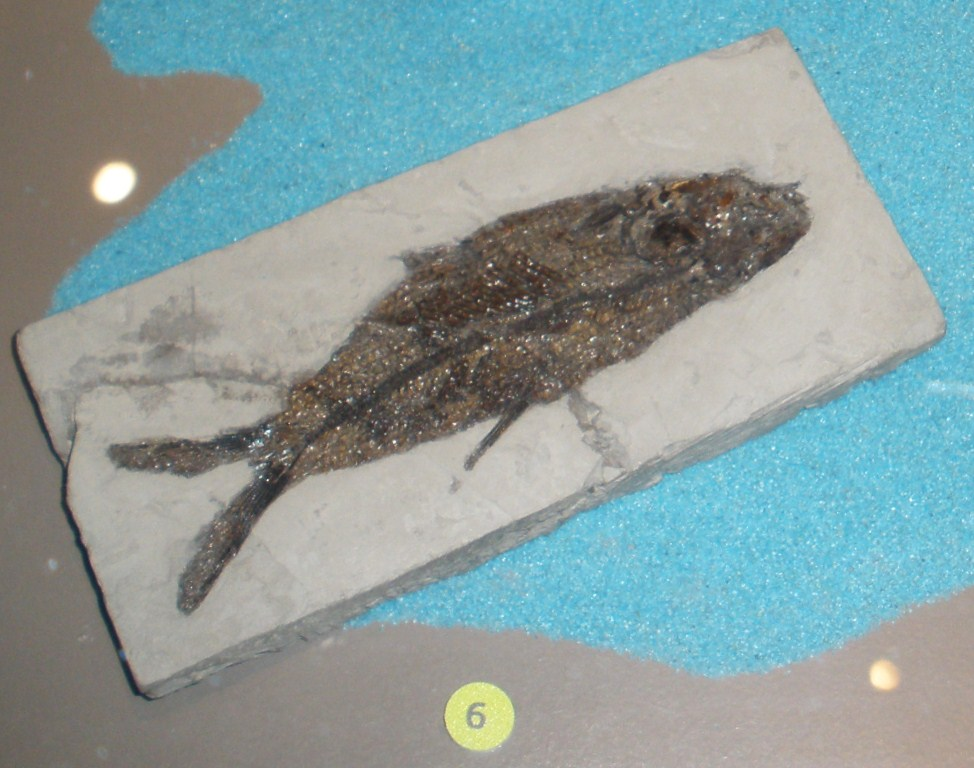 Fossil of Aethalionopsis, an extinct fish Took the photo at Musee d'Histoire Naturelle, Brussels